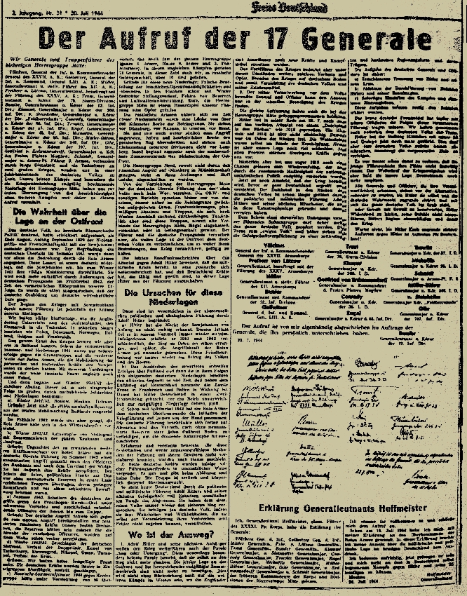 Die Zeitung Freies Deutschland vom 30. Juli 1944: Der Aufruf der 17 Generale